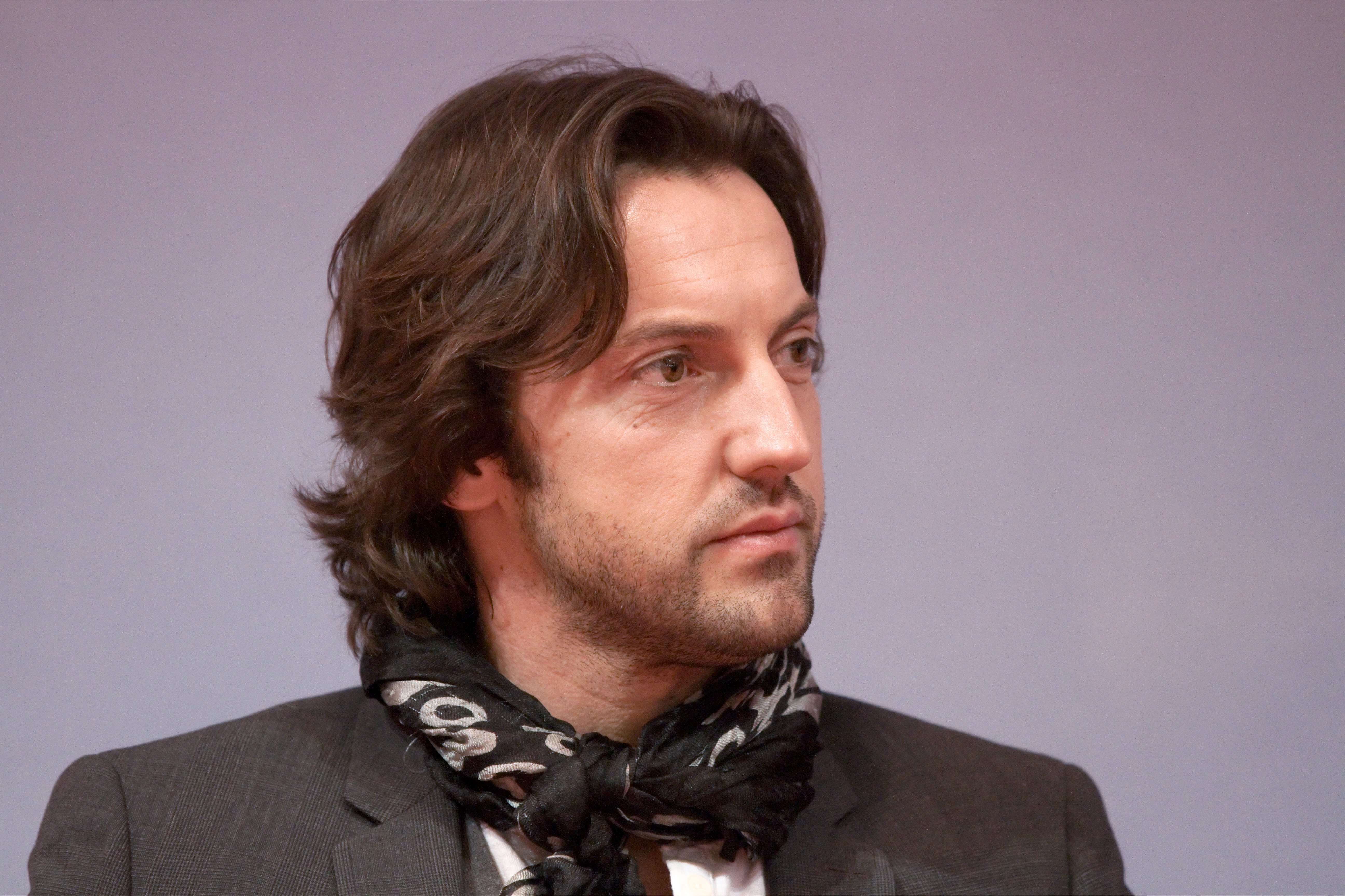 Frédéric Diefenthal au Salon du livre de Paris pour la promotion du téléfilm Chateaubriand.